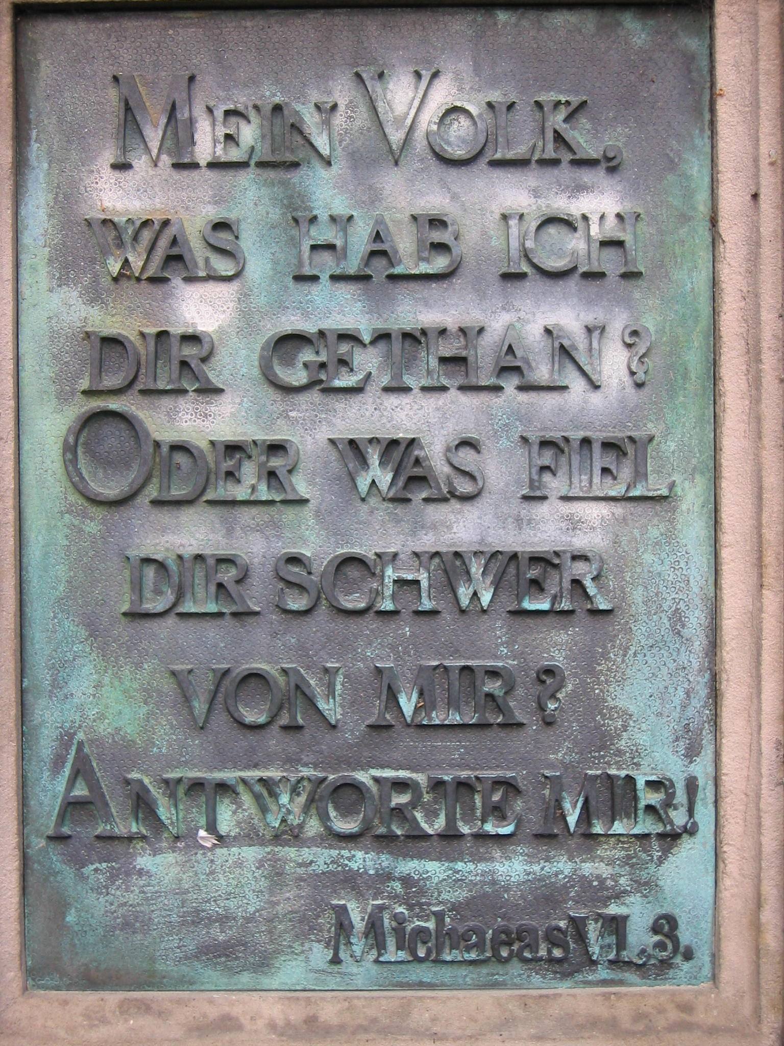 Tafel am Marienbrunnen in Freiburg (Unterlinden)